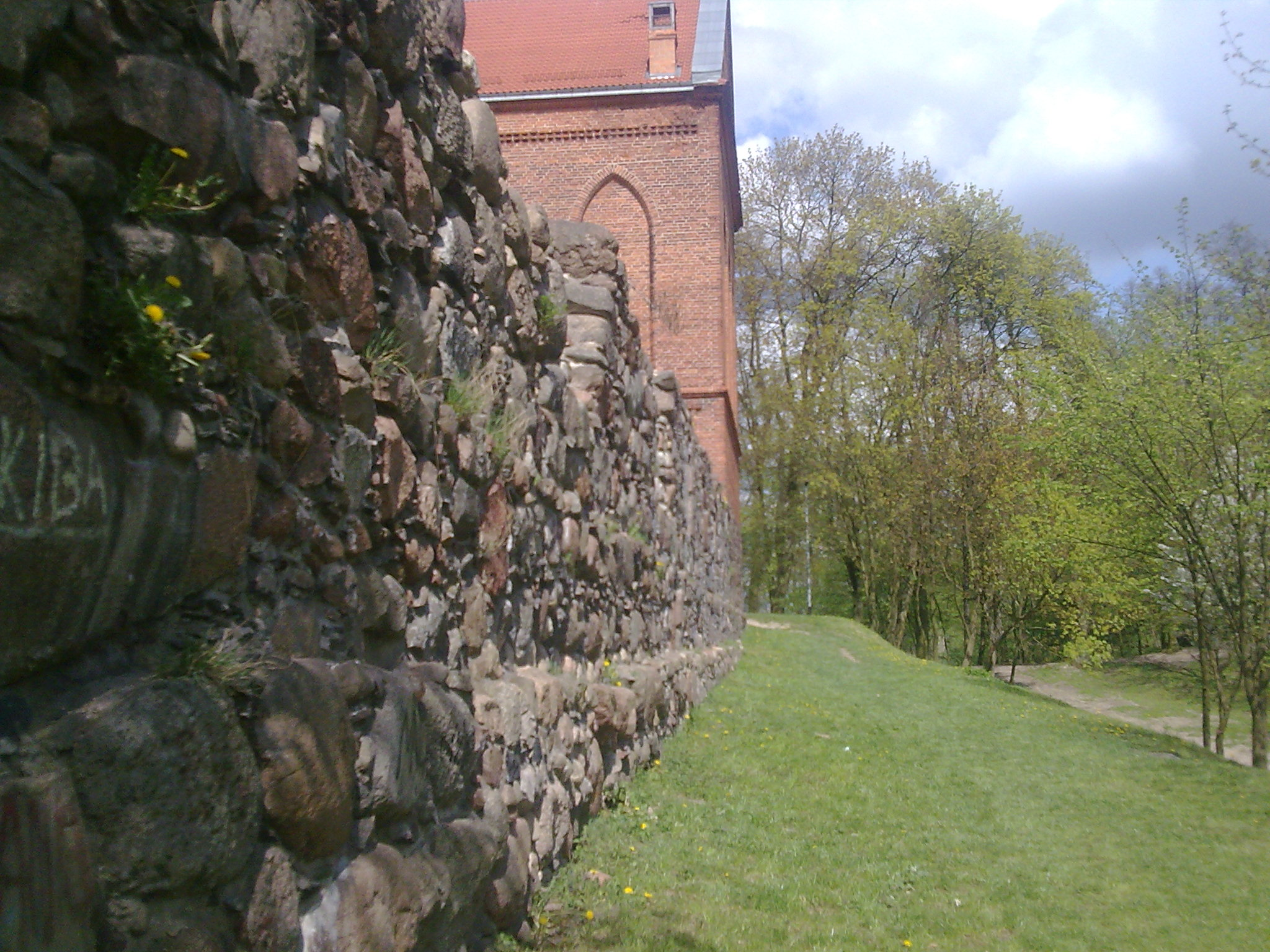 Mury przy Wieży Zamkowej